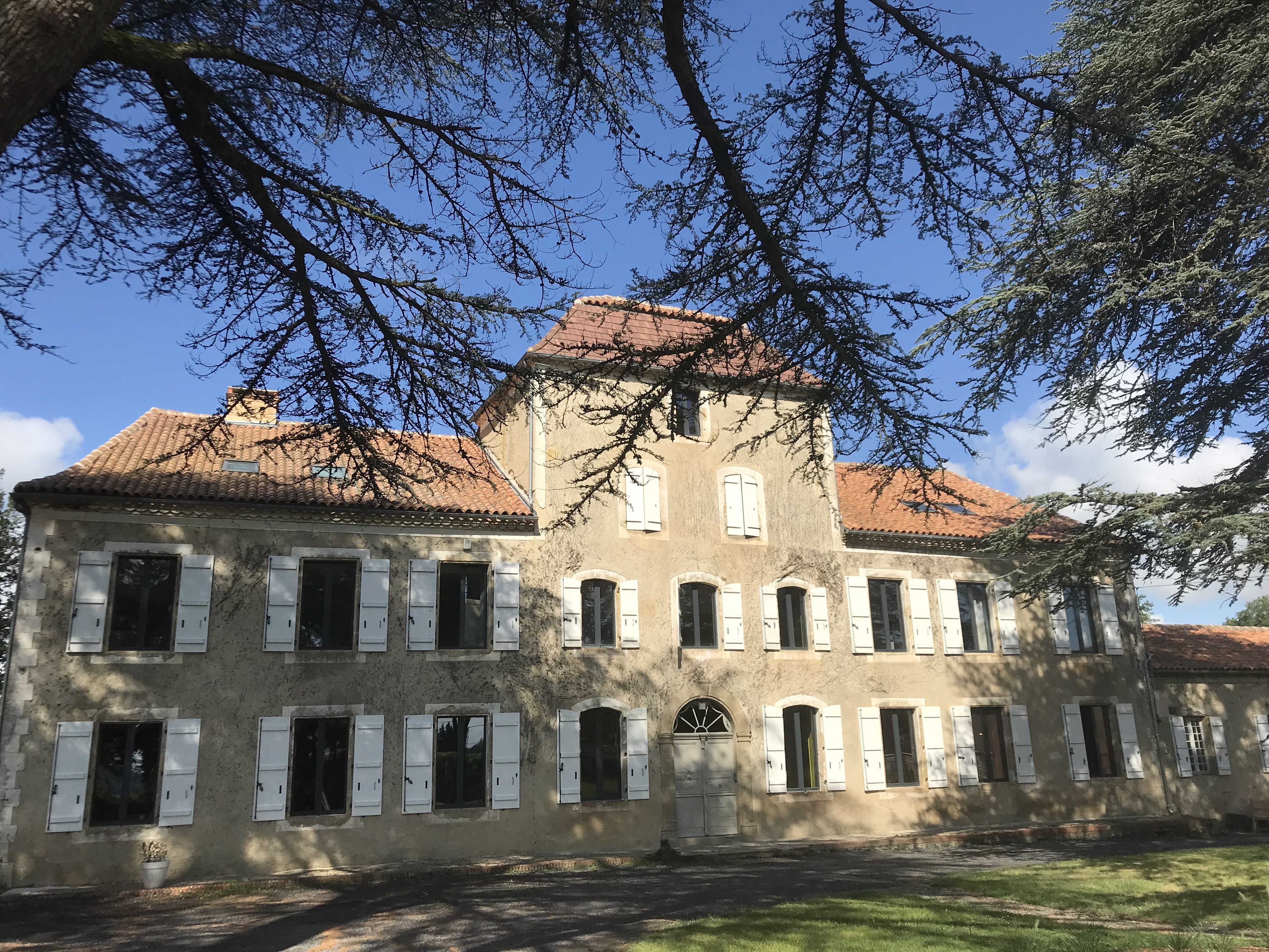 Château de Maumusson en 2018